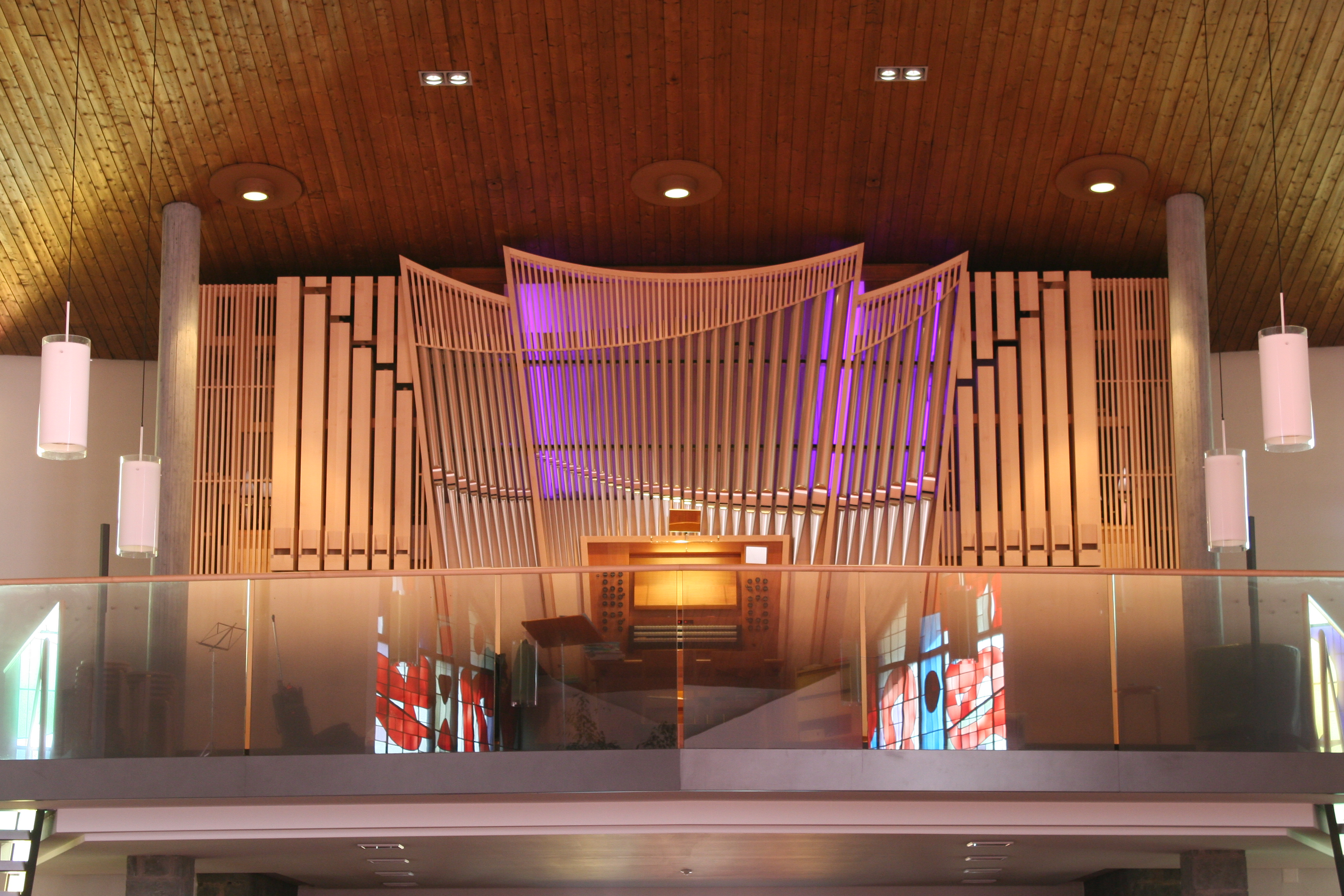 Römisch-katholische Pfarrkirche St. Antonius Wallisellen Orgel